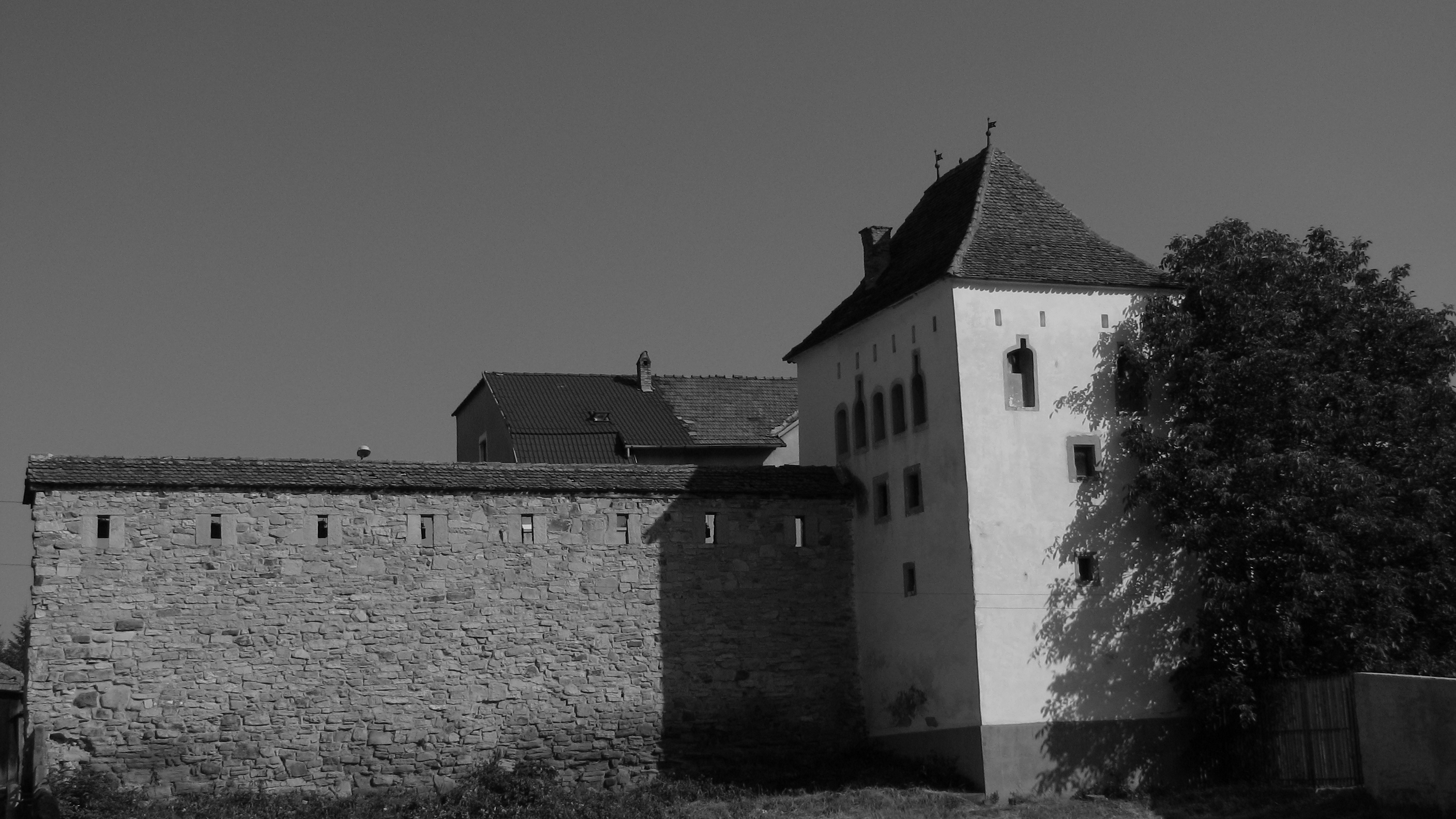 Turnul Dogarilor - Bistrita